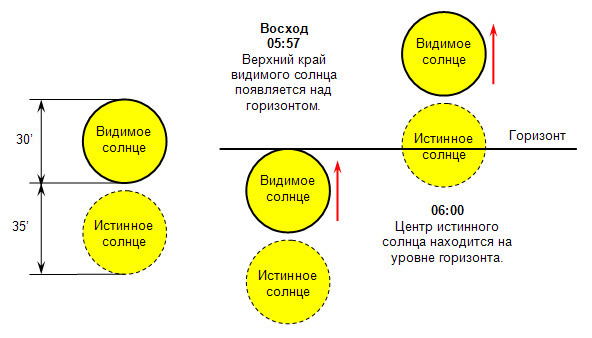 Взаимное расположение истинного и видимого солнце на восходе и закате